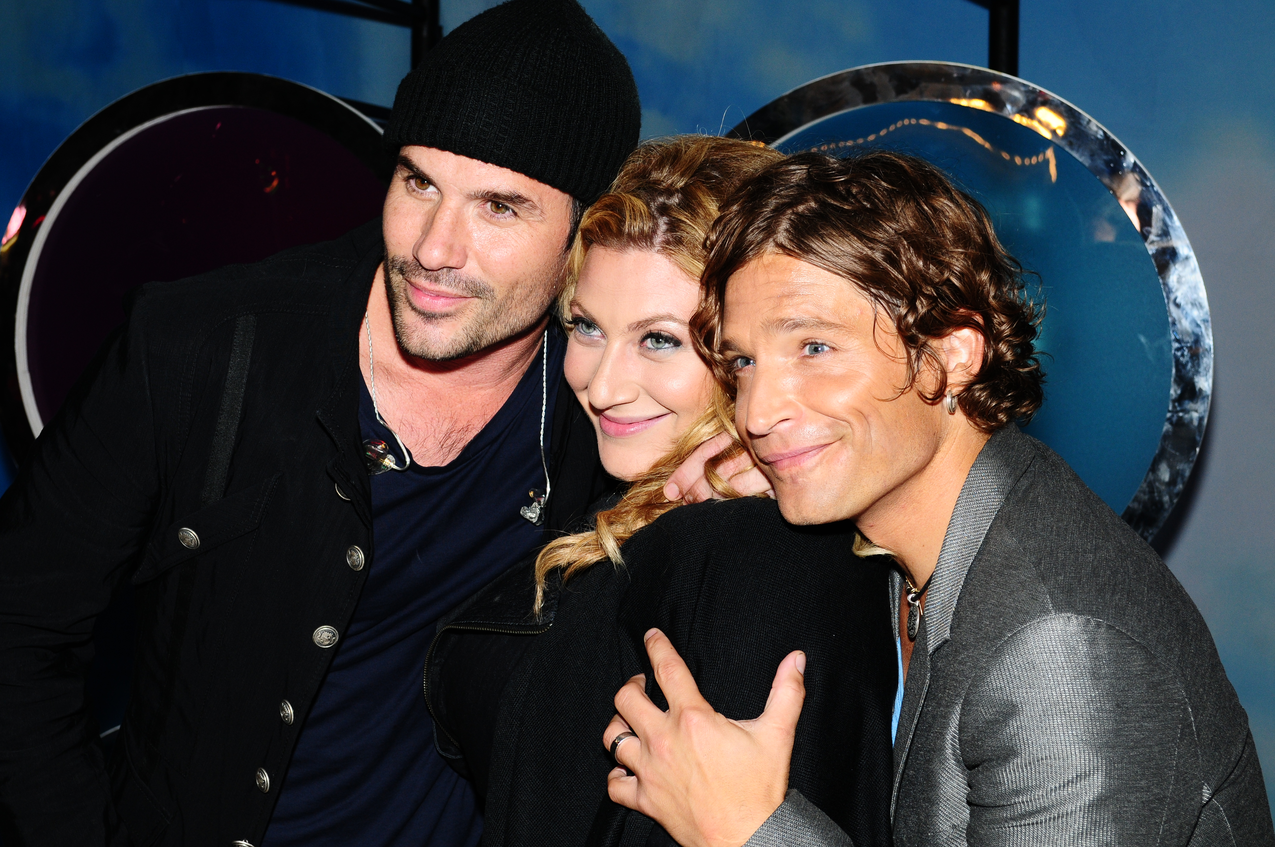 Martin Stenmarck, Sarah Dawn Finer & Andreas Johnson på Sommarkrysset